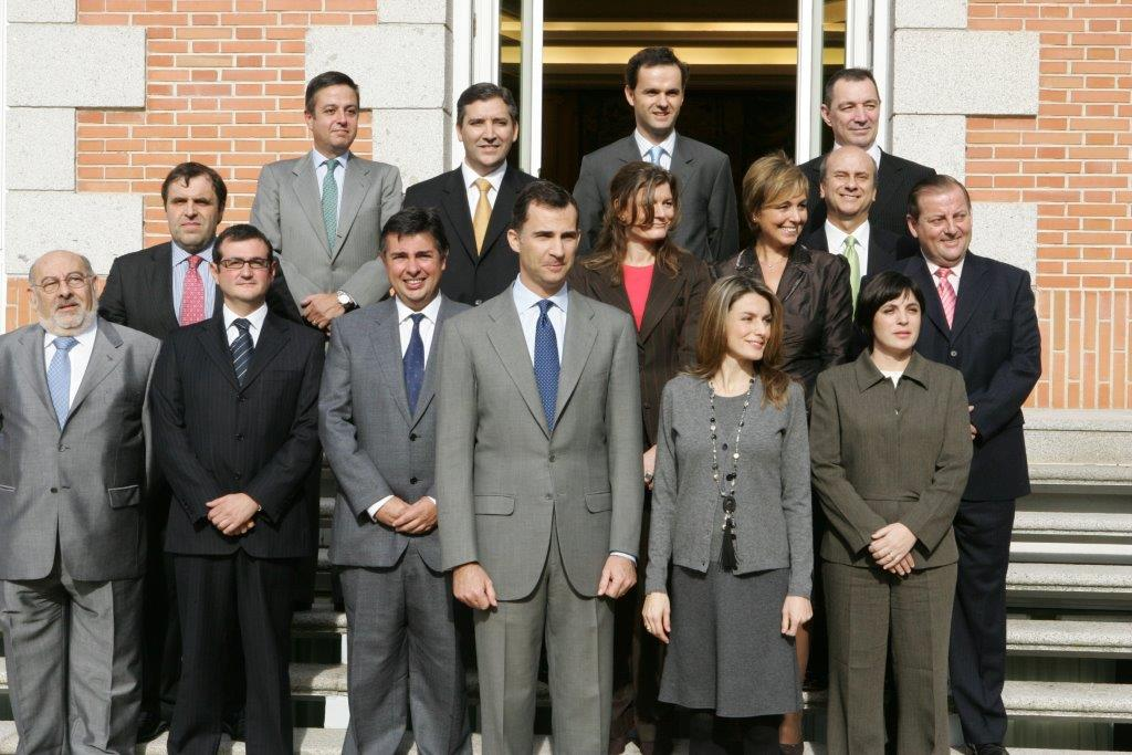 Los Príncipes de Asturias reciben a la Asociación Española de Anunciantes, La Zarzuela, marzo 2006.